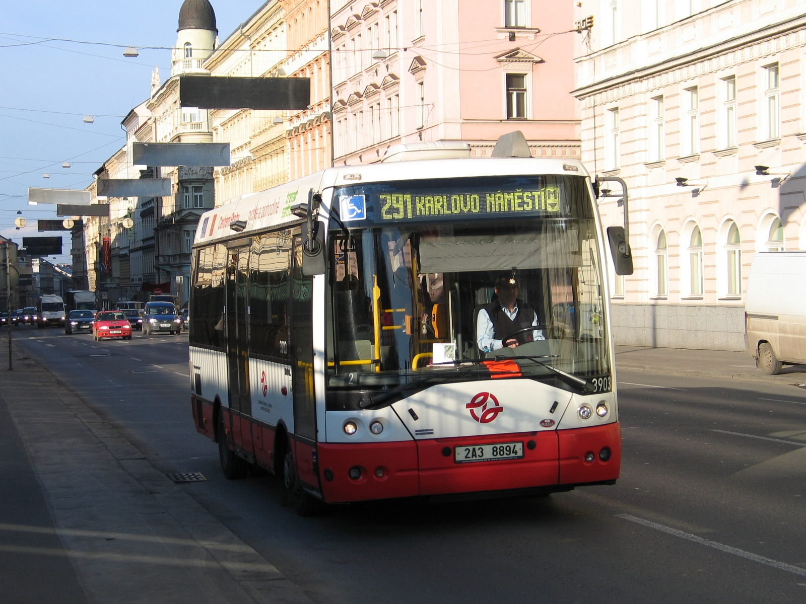 Ikarus E91, Praha, Sokolská ulice, linka 291